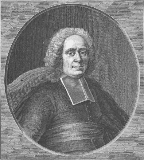 Portrait de Charles Rollin